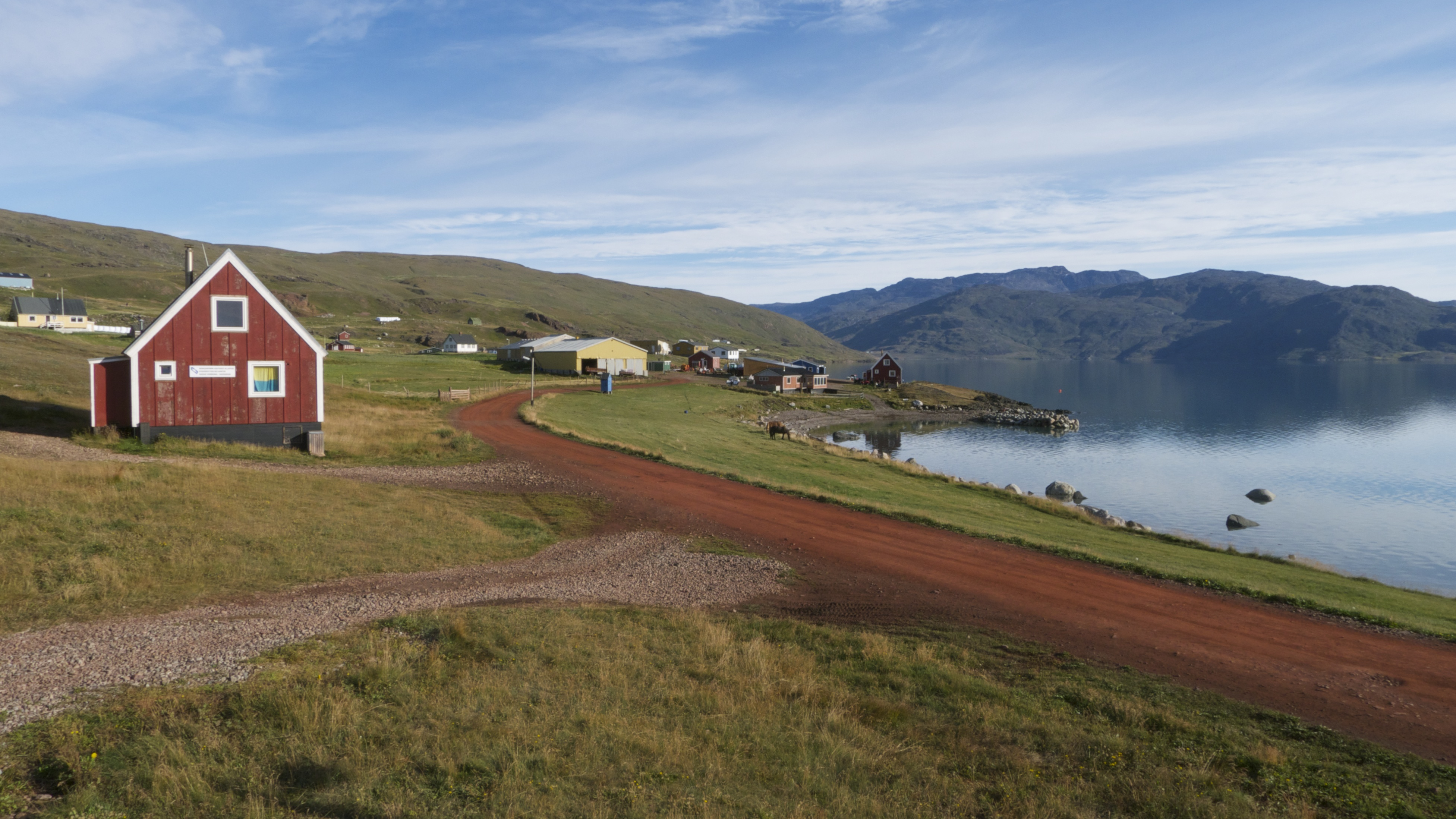 qassiarsuk